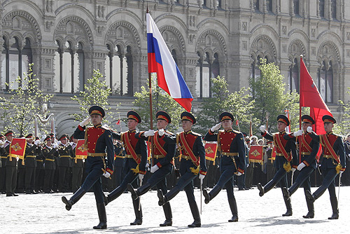 Москва. Военный парад в честь 64-й годовщины Победы в Великой Отечественной войне. На Красную площадь вносятся Государственный флаг Российской Федерации и Знамя Победы в Великой Отечественной войне 1941-1945 годов.